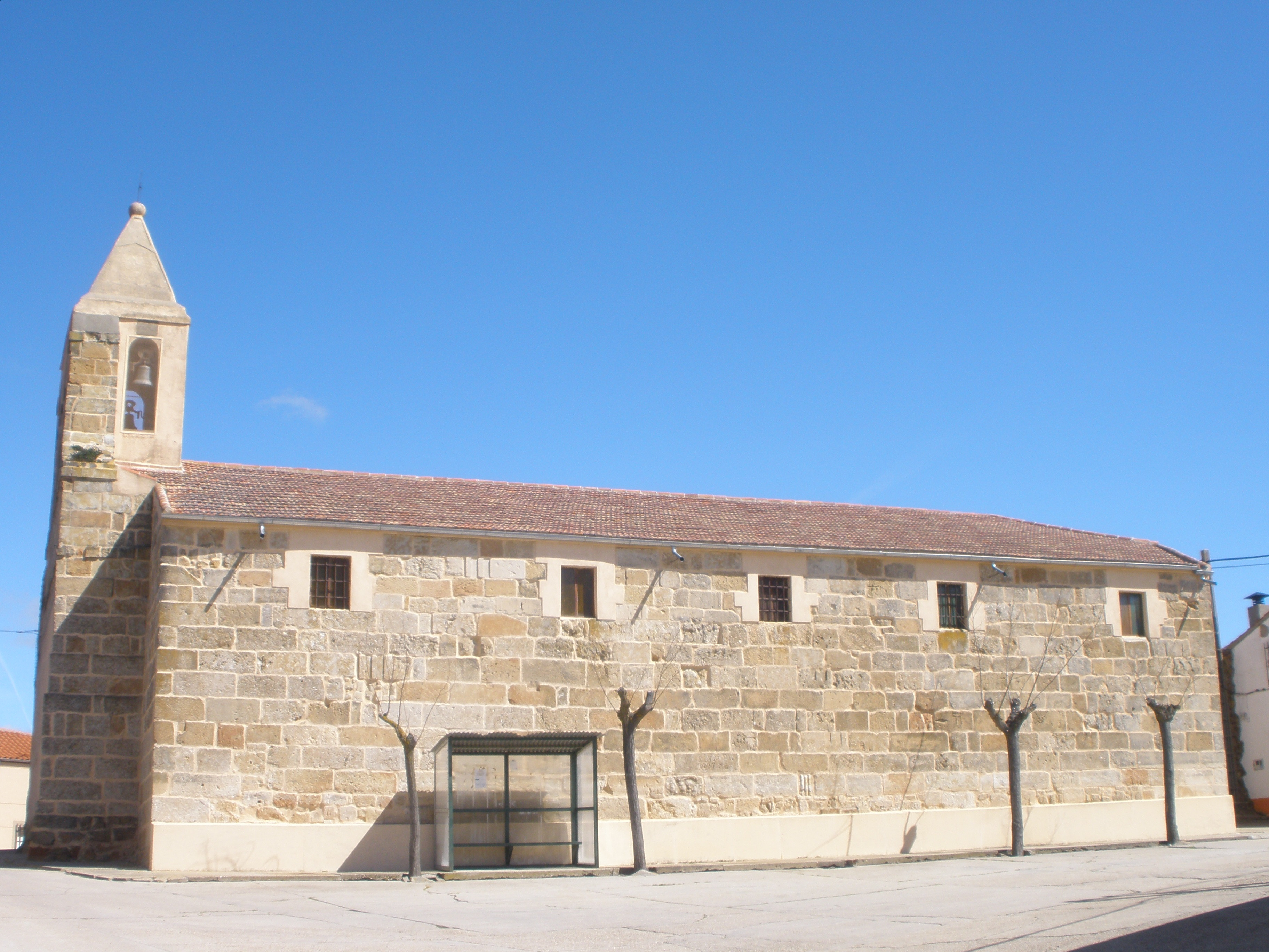 Esta es la iglesia del pueblo, donde se celebran actualmente las ceremonias religiosas.